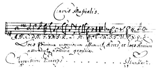 A kuruc titkosírás egyik fajtája, a Clavis Musicalis